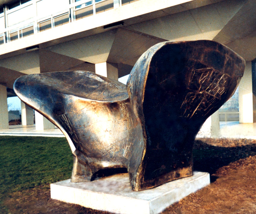 Eigen werk. "Zetel der Rijks Belastingen" Leeuwarden 1972 door Hein Kocken.